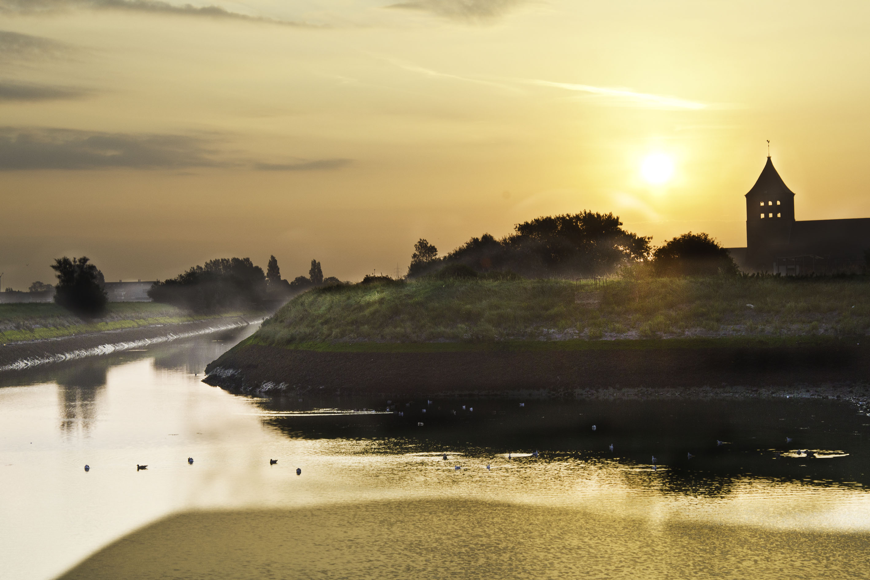 Rustige septembermorgen rond 8 uur